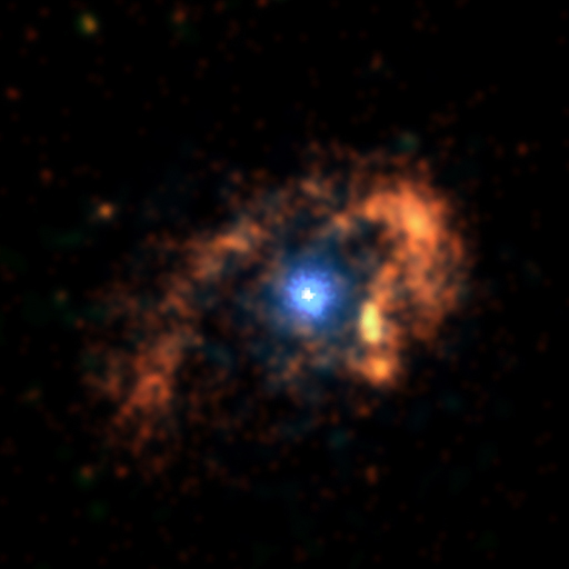 Horse-Shoe Nebula; Aufnahme der Umgebung von η Carinae im Röntgenbereich durch das Chandra-Weltraumteleskop.